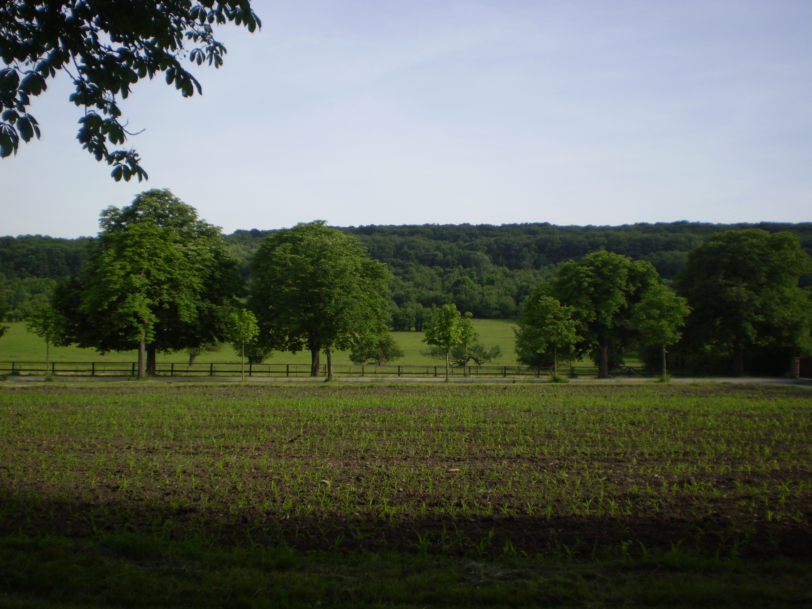 Blick über die Hohenauer Wiese im Lainzer Tiergarten Richtung Maurer Wald.